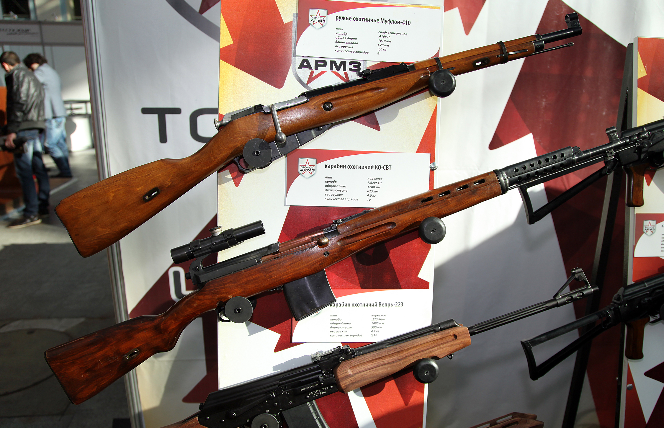 410х76 ружье Муфлон-410 и 7,62х54R карабин КО-СВТ (410x76 hunting rifle Muflon-410 and 7,62x54R carbine KO-SVT)